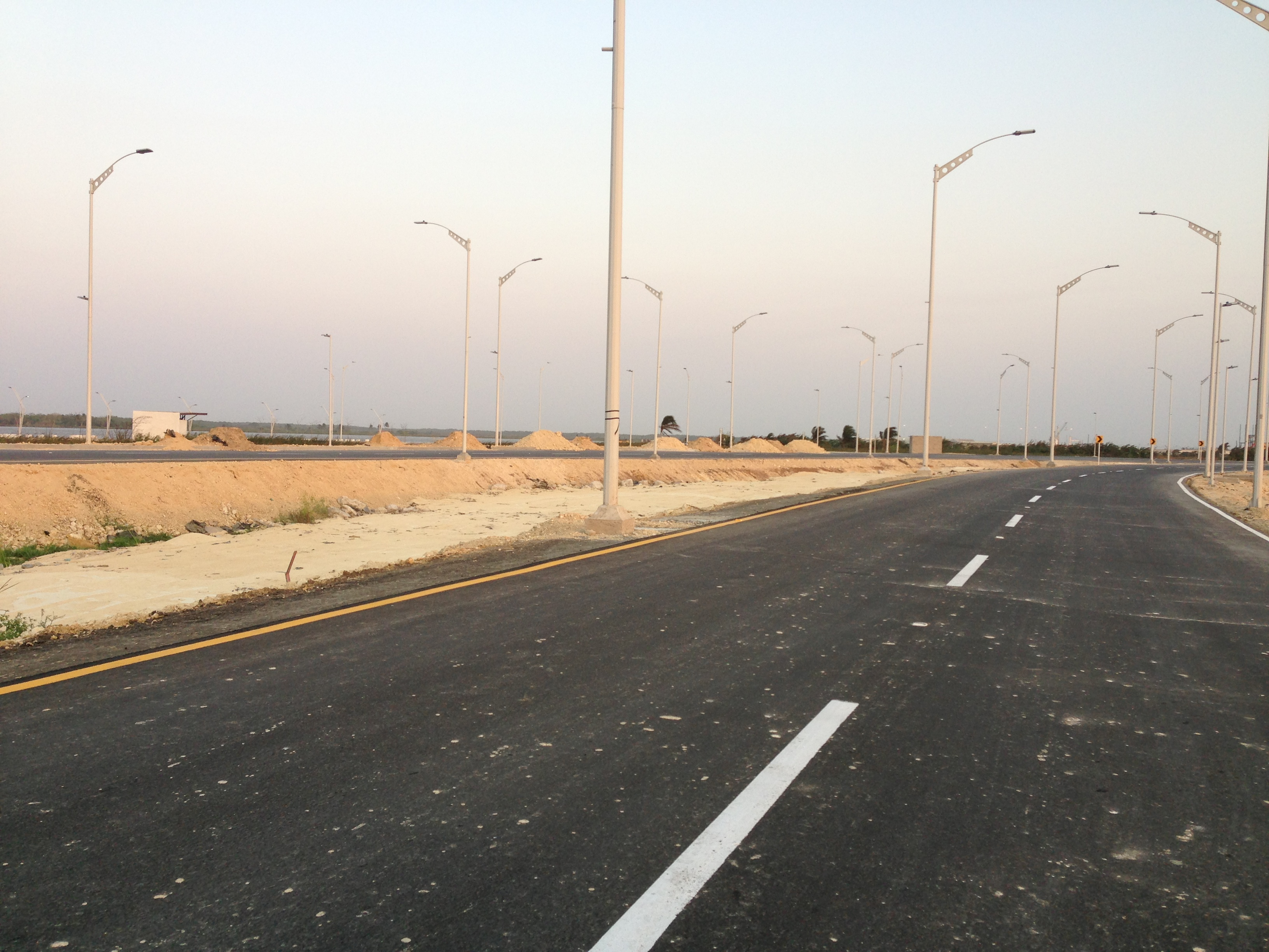 Doble calzada de la avenida del Río